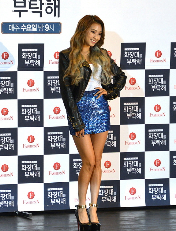 티캐스트 패션앤 '뷰티배틀쇼 화장대를 부탁해' 기자간담회 (보라)